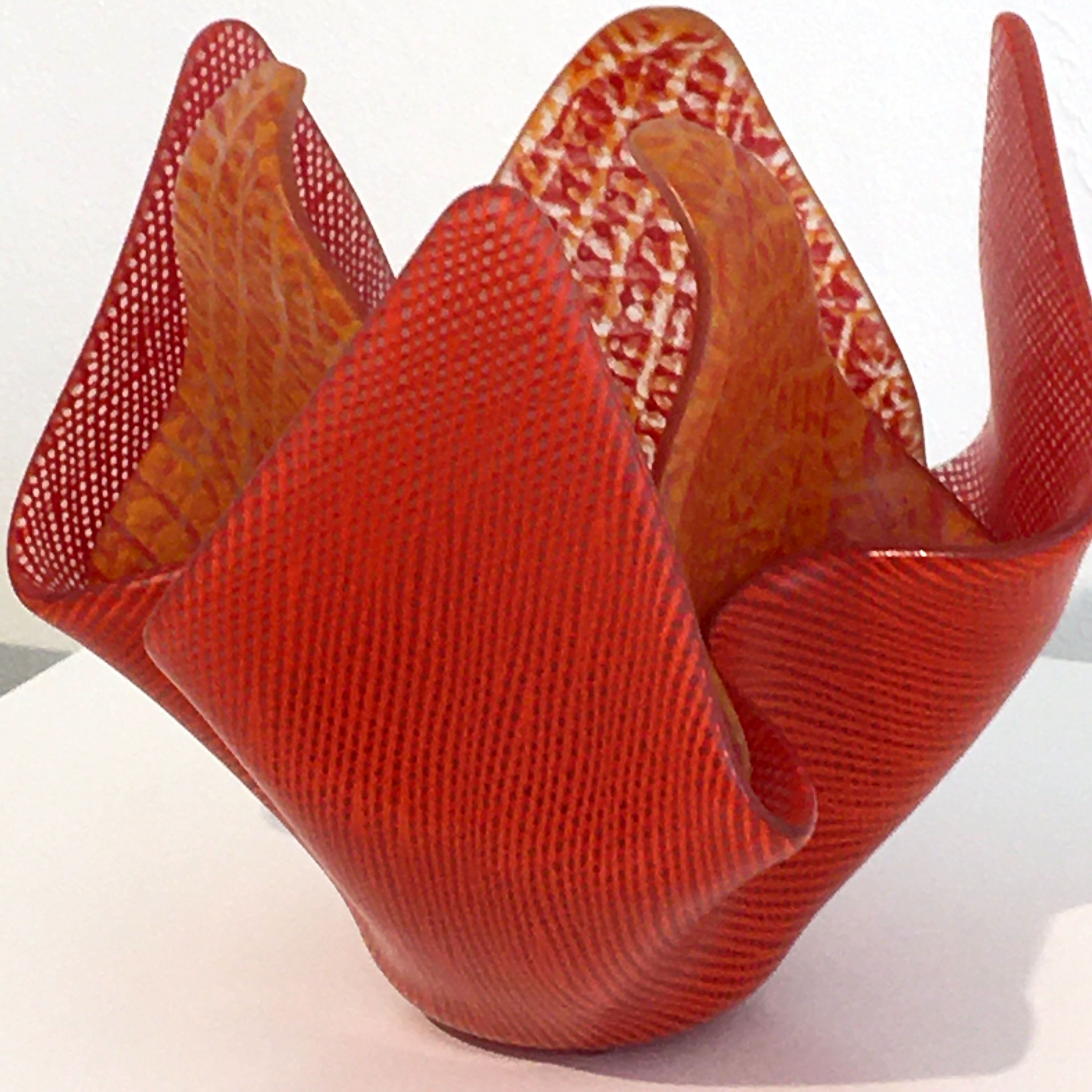 Objekt in Verschmelztechnik